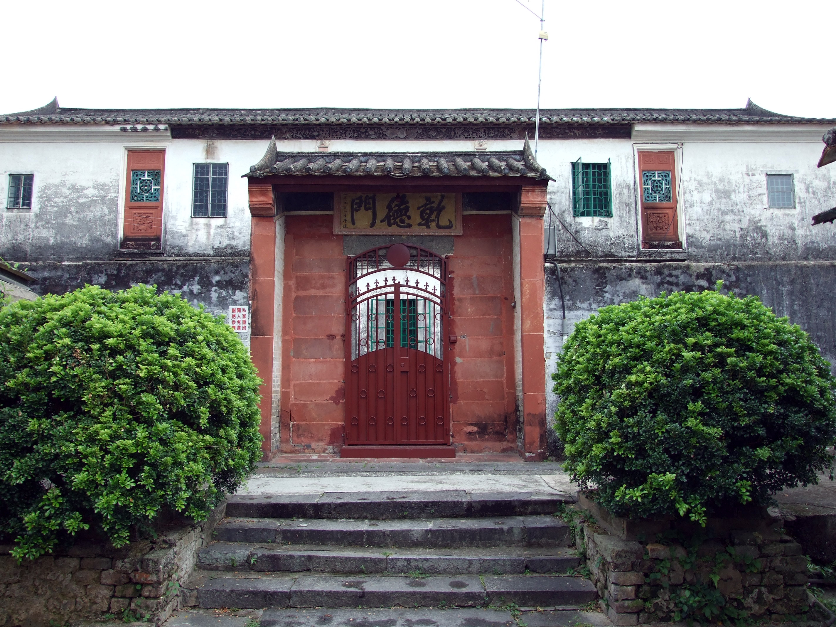 中文（香港）: 乾德門與乾德樓